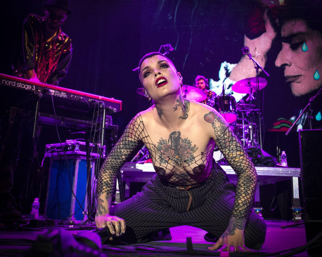 En la tarde noche del gran día de San Isidro, las actividades siguieron sucediéndose, congregando a miles de madrileños y madrileñas y visitantes en sus diferentes escenarios.